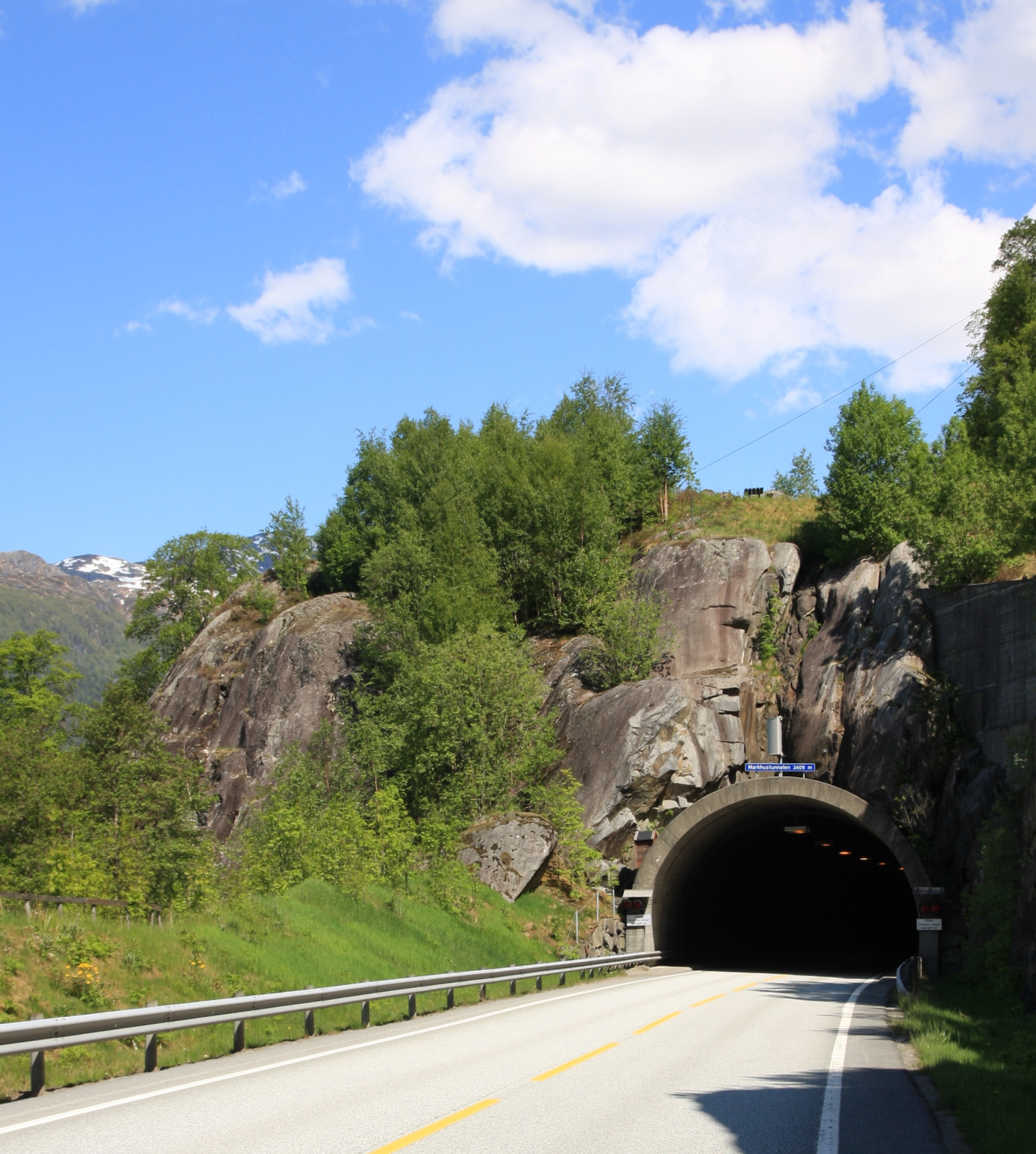 Markhustunnelen